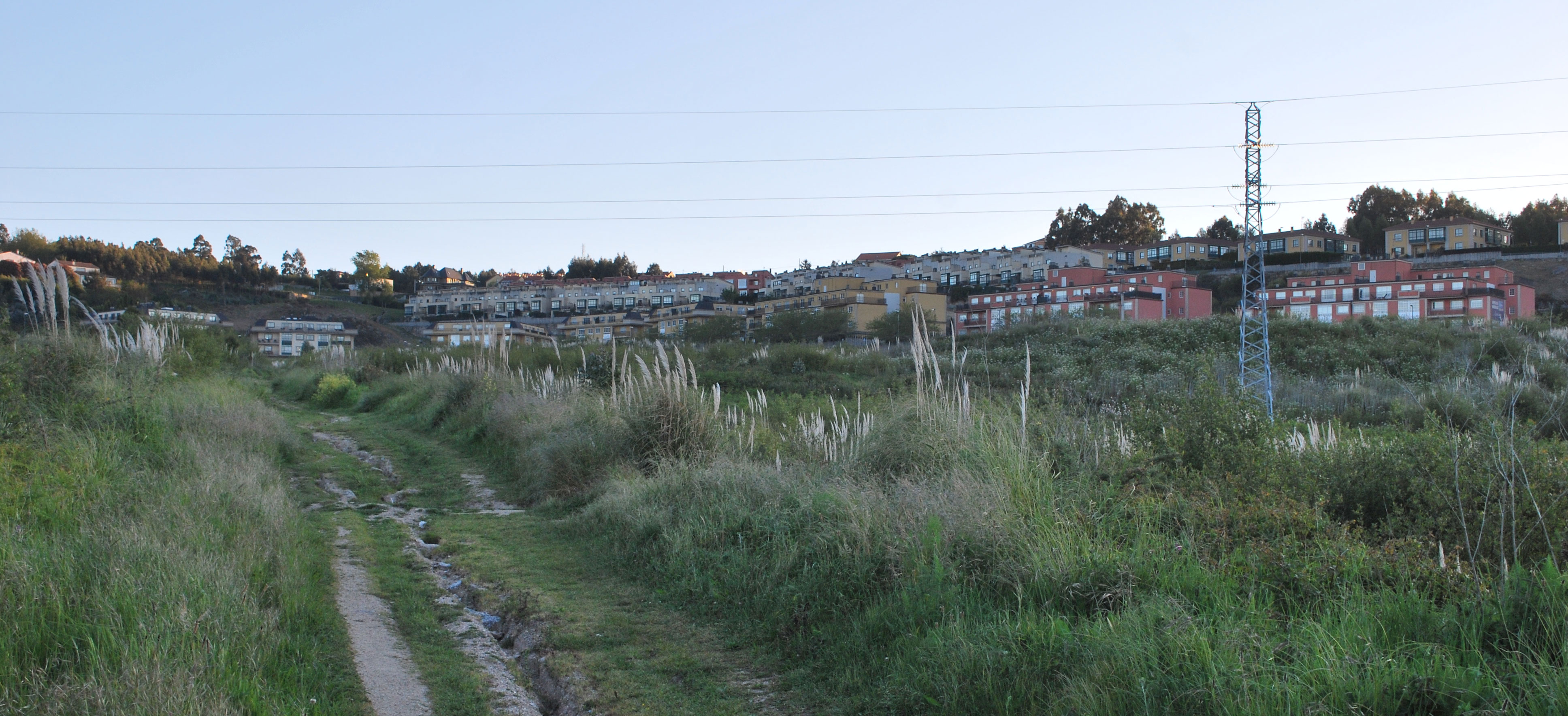 Vista da urbanización Altamira na Zapateira A Coruña Culleredo Galiza Spain